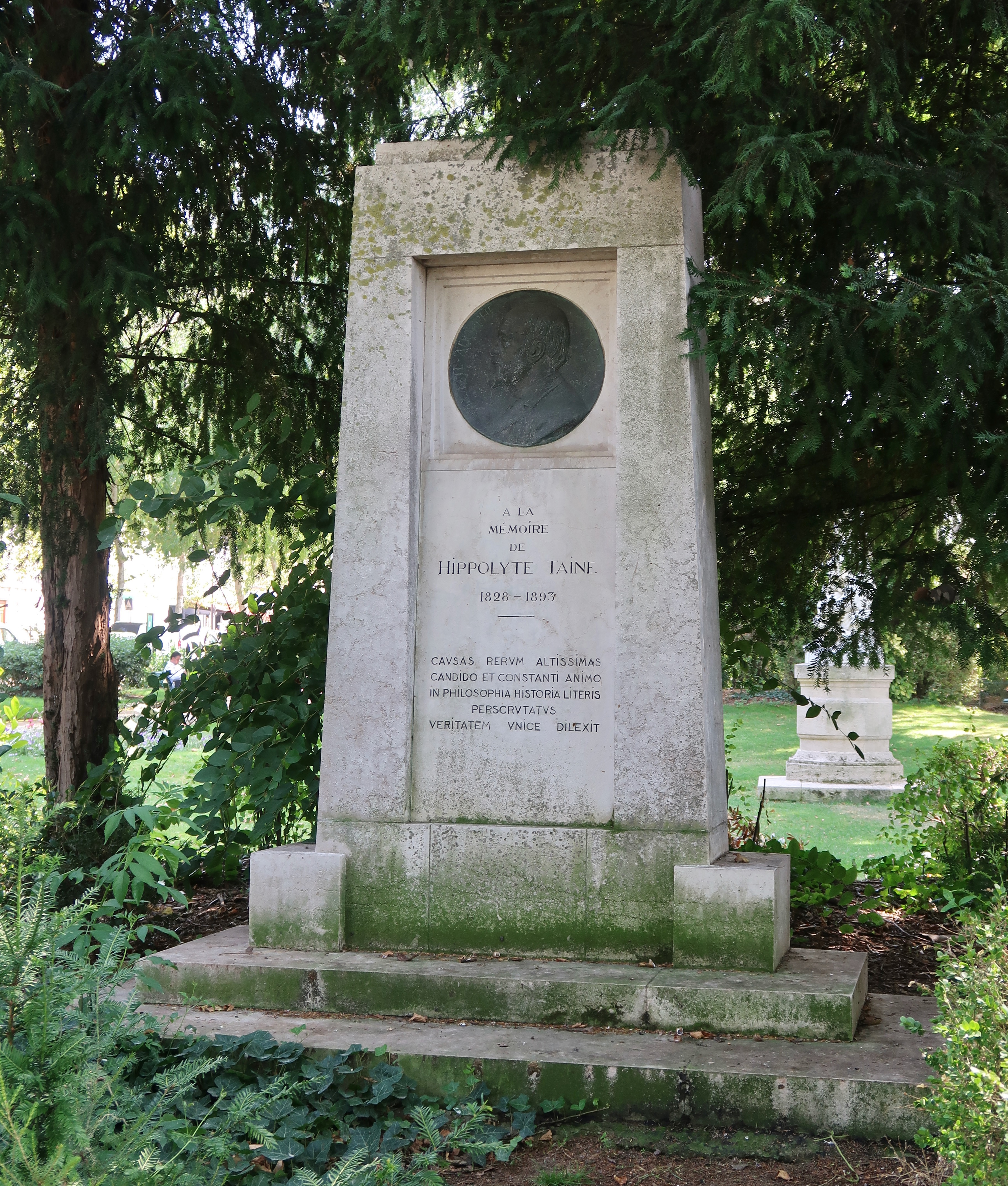 Monument dédié à la mémoire d'Hippolyte Taine dans le square d'Ajaccio (Paris, 7e), médaille réalisée par Oscar Roty.